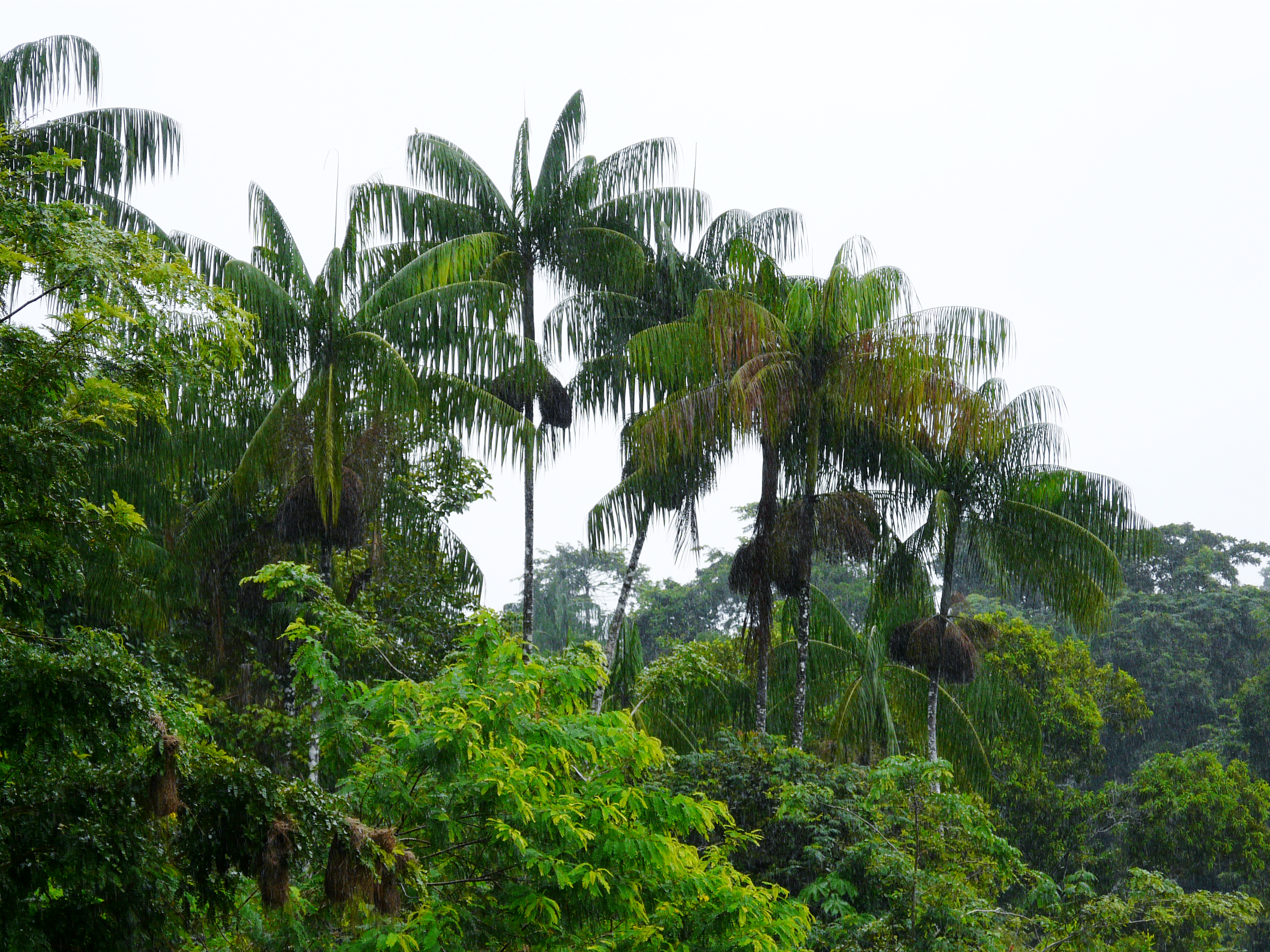 Tüüpiline salat-euterpepalmisalu (Euterpe oleracea). Pildistatud Rio Negro ääres mai alguses.